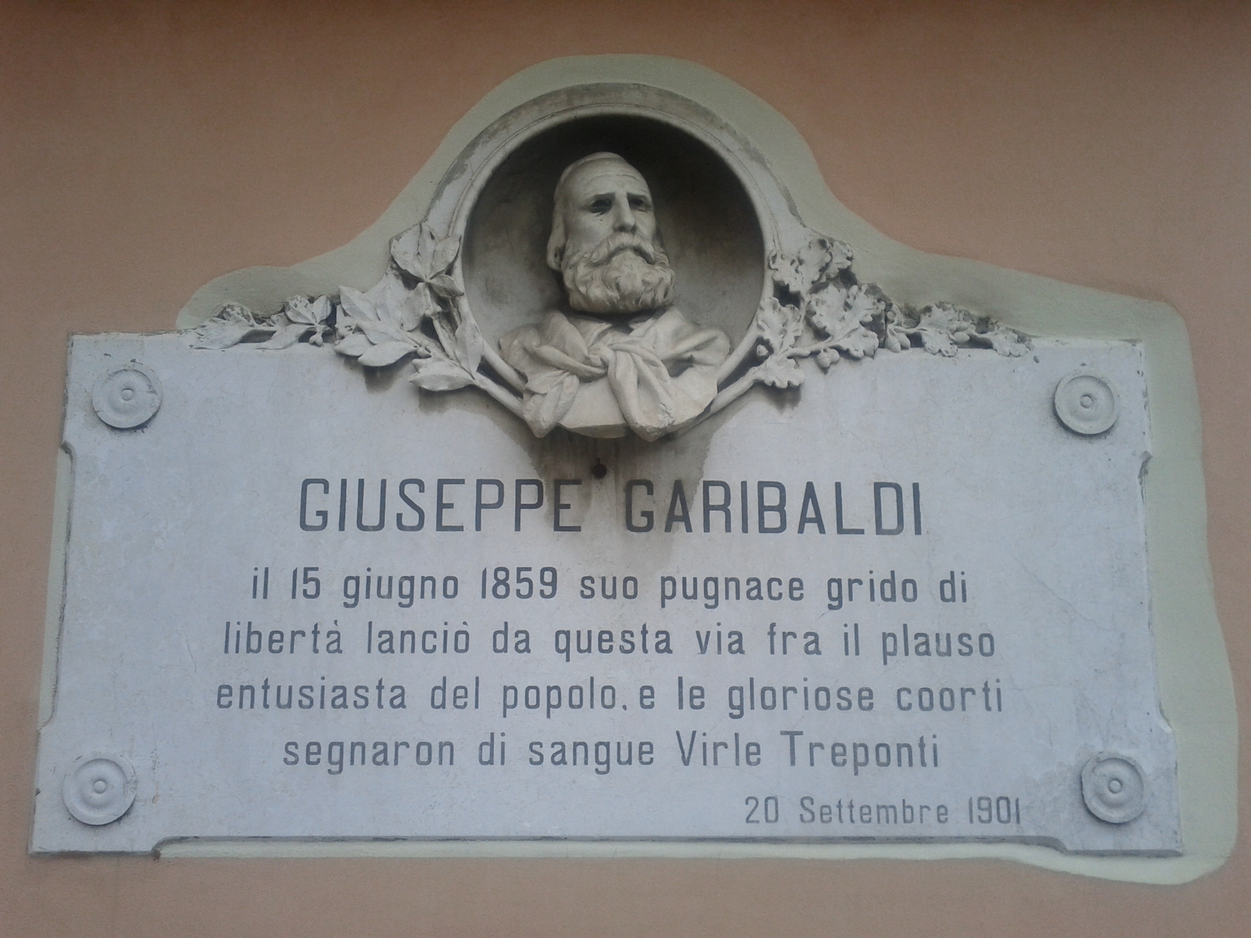 Giuseppe Garibaldi a Rezzato